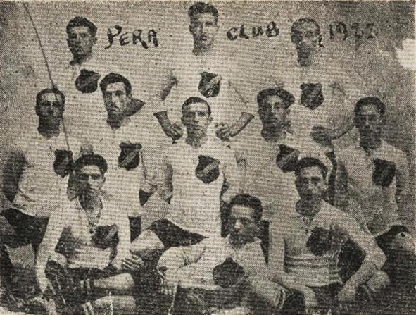 Η ομάδα του αθλητικού συλλόγου Πέρα Κλουμπ το 1922